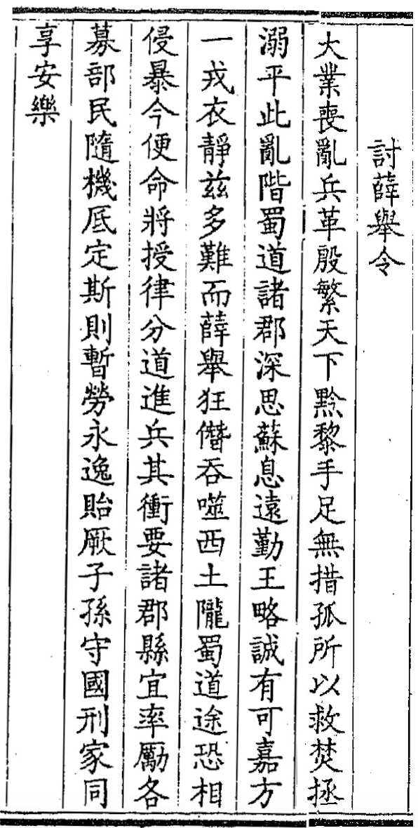 中文（中国大陆）: 四库全书钦定全唐文讨薛举令